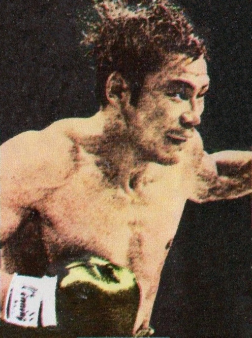 CAMPIONI dello SPORT 1973/74-Figurina n.300- WAJIMA - GIAPPONE -PUGILATO-Rec